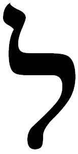 hebrew letter lamed